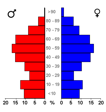 Age pyramids for the 443 municipalities in the Netherlands. Data 2007. Statistics provided by Centraal Bureau voor de Statistiek, Voorburg/Heerlen. Source: Tabel: Bevolking Nederland per gemeente en diverse regio's naar leeftijd, geslacht en burgerlijke staat, 1 januari 1988-2007. Gewijzigd op 24 mei 2007 (on-line database StatLine) Bevolkingspiramide - Gemeente Bergen (NH.) (2007).png